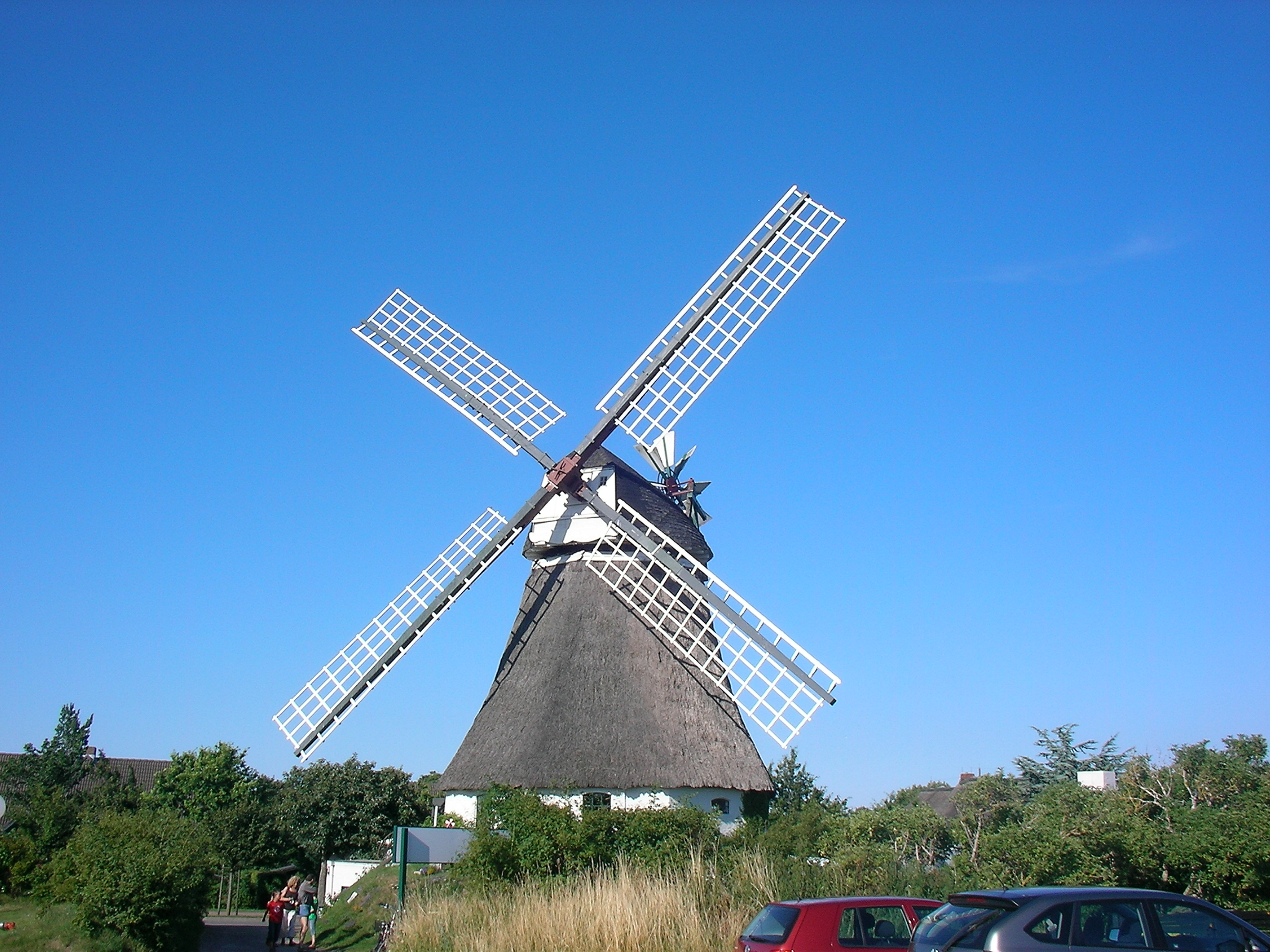 Windmühle in Wrixum